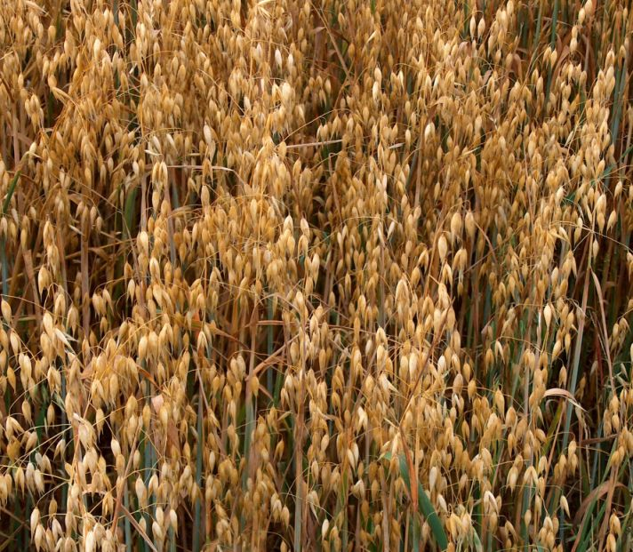 Saat-Hafer im Juli